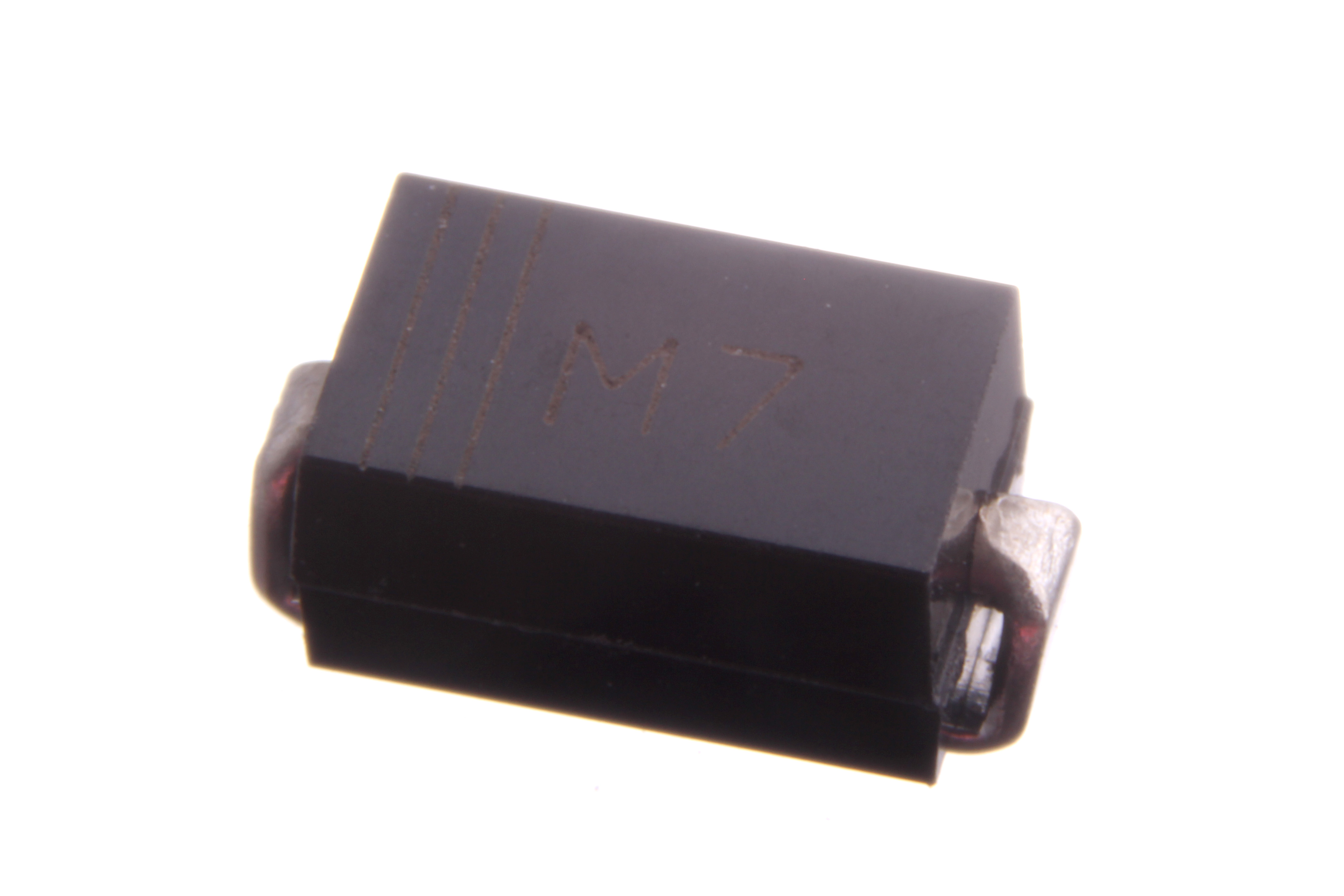 M7 1A DO-214 general purpose rectifier diode.